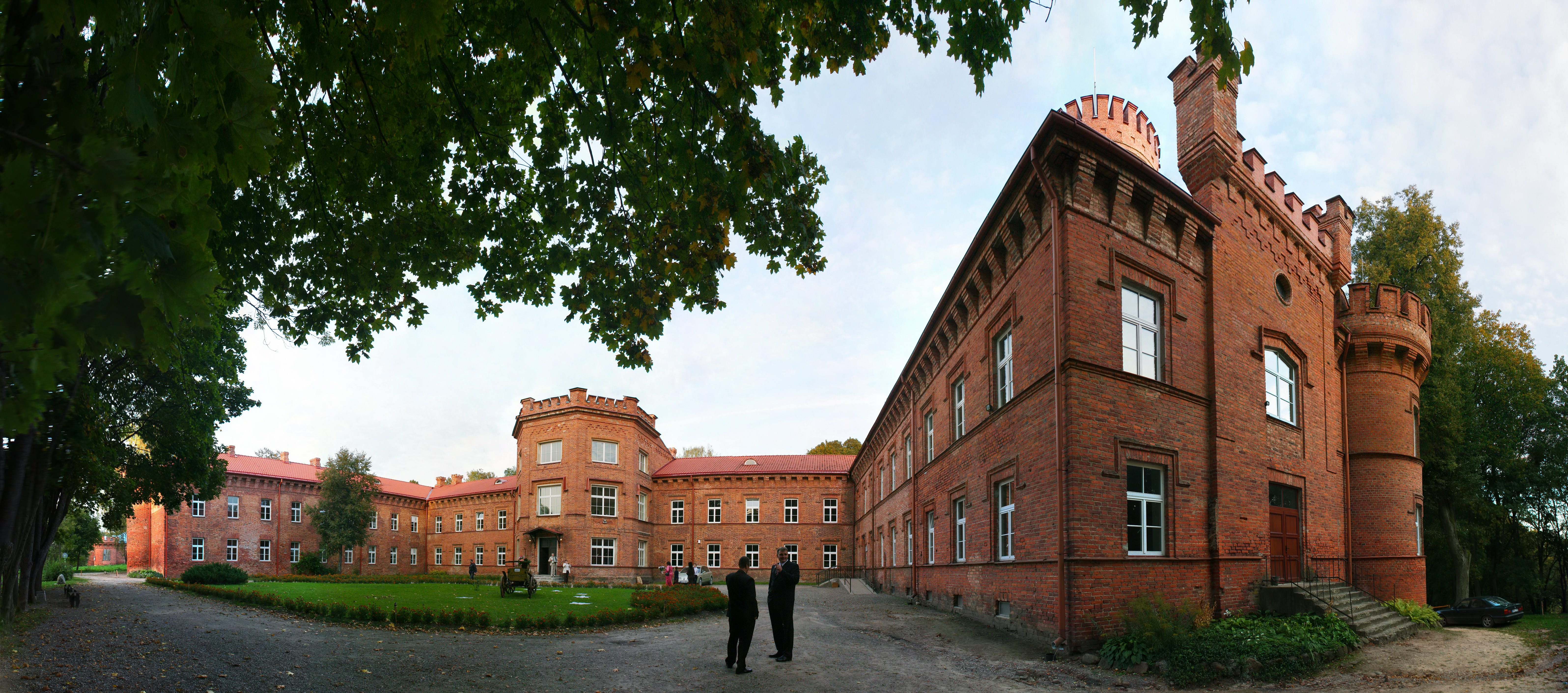 Raudonė Castle, Lithuania